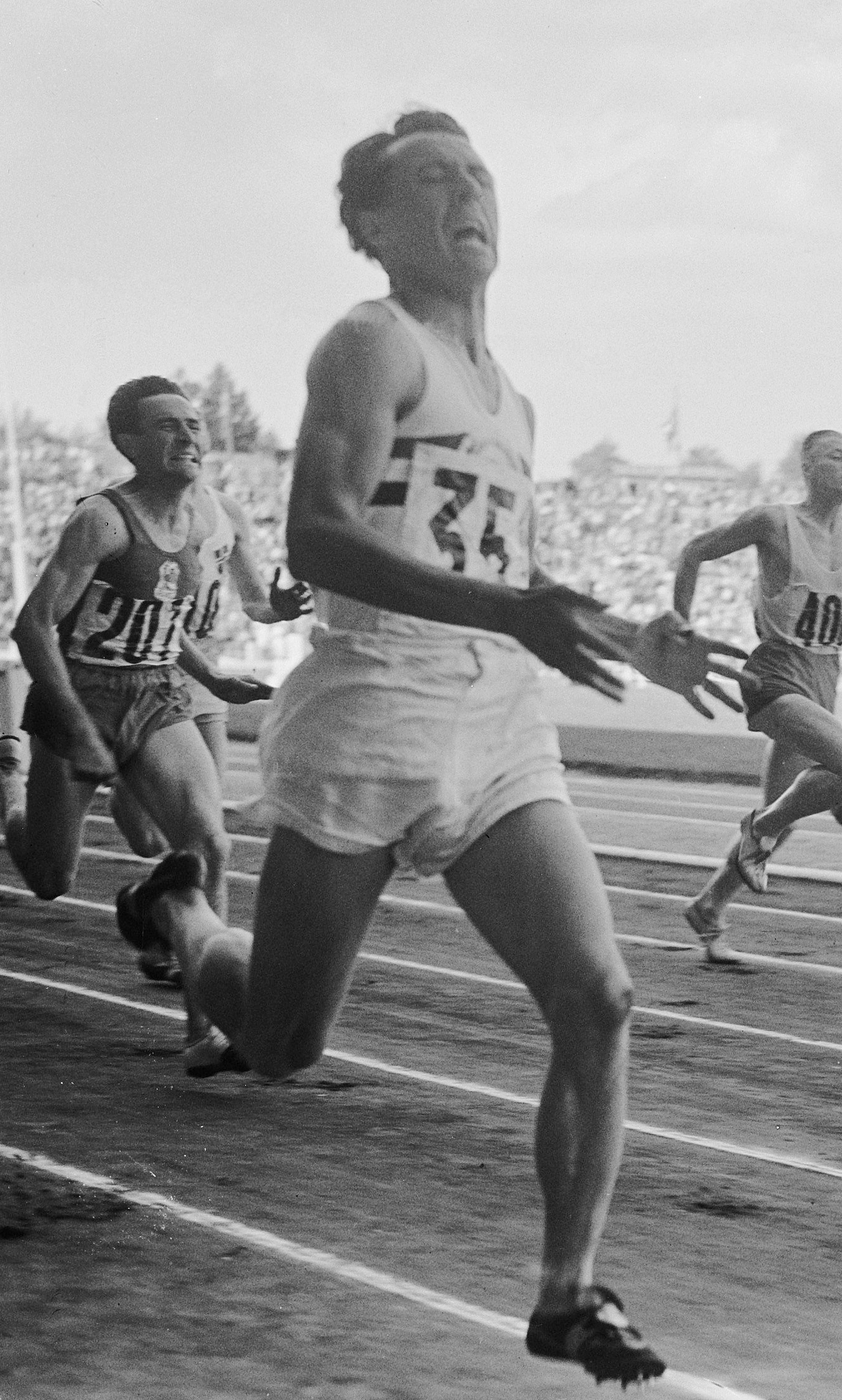 Finish van de 200 meter bij de Europese kampioenschappen in Brussel. Winnaar links de Brit Brian Shenton, in het midden de Nederlander Jan Lammers die derde werd